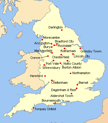 Répartition des clubs en League Two 2009-2010.